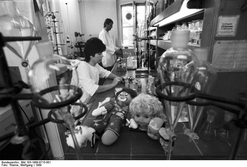 Karl-Marx-Stadt, Spielzeug im Test ADN-ZB/Thieme 15.7.89 Bez. Karl-Marx-Stadt: Spielzeug im Test Auf seine gesundheitliche Unbedenklichkeit wird im Hygieneinstitut Zwickau sämtliches in der DDR neuentwickelte Spielzeug geprüft, bevor es produziert und verkauft werden darf. Kristine Sagaster und Laborleiter Frieder Zenner testen hier Puppen, deren Farbstoffe garantiert "lutschfest" sein müssen. In der DDR unterliegen alle Spielwaren den gleichen Bestimmungen wie Gegenstände, die mit Lebensmitteln in Berührung kommen. Das Zwickauer Institut prüft neben der Speichel- und Scheißechtheit bunter Oberflächen auch die Toxizität und Bruchfestigkeit der Materialien.